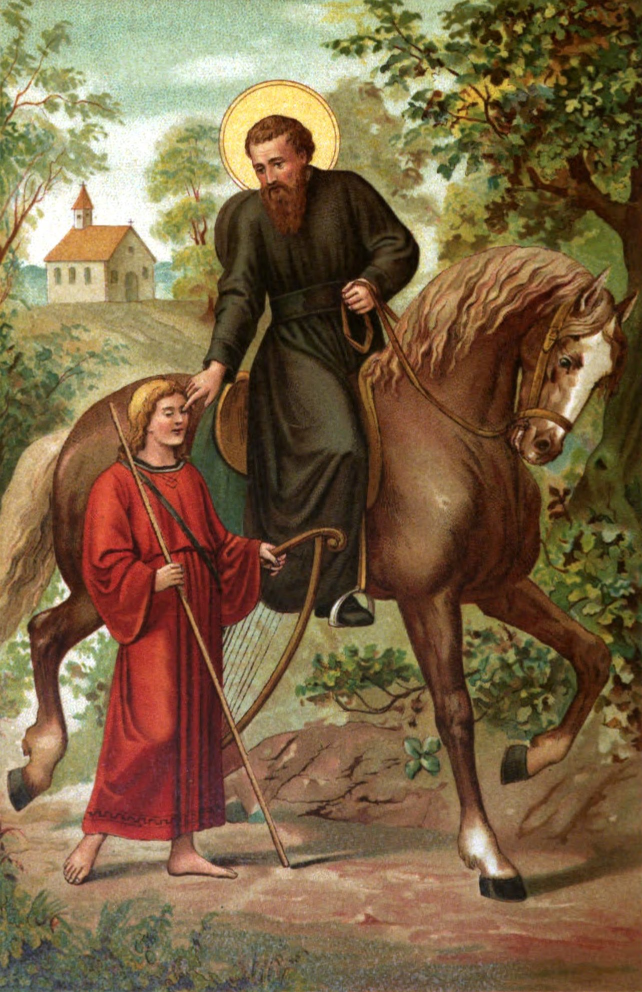 De H. Ludger geneest Bernlef